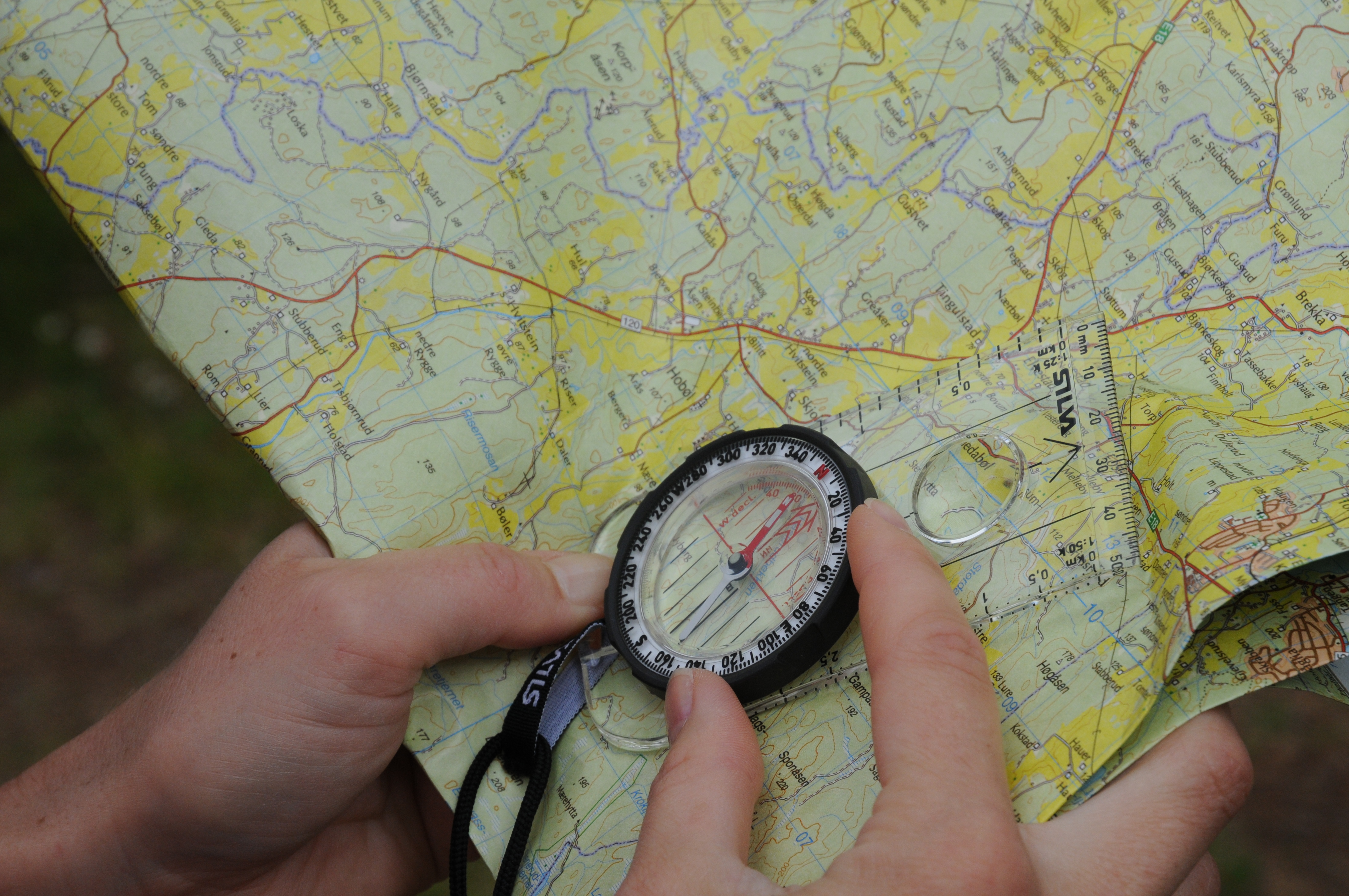 Kartserien Norge 1:50000. Kart og kompass er obligatorisk på fjellturen! Foto: Kartverket